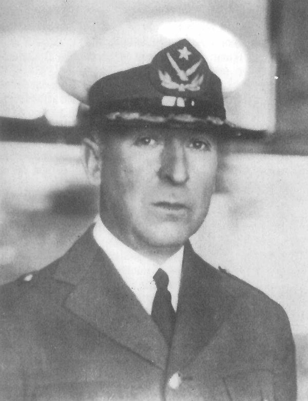 Marmaduke Grove Vallejo (Copiapó, 6 de junio de 1878 - Santiago, 15 de mayo de 1954) (erróneamente llamado Marmaduque Grove, ya que su nombre es de origen irlandés) fue un militar, revolucionario y político chileno que intervino de forma gravitante en la vida política de su país en las décadas de 1920 y 1930.